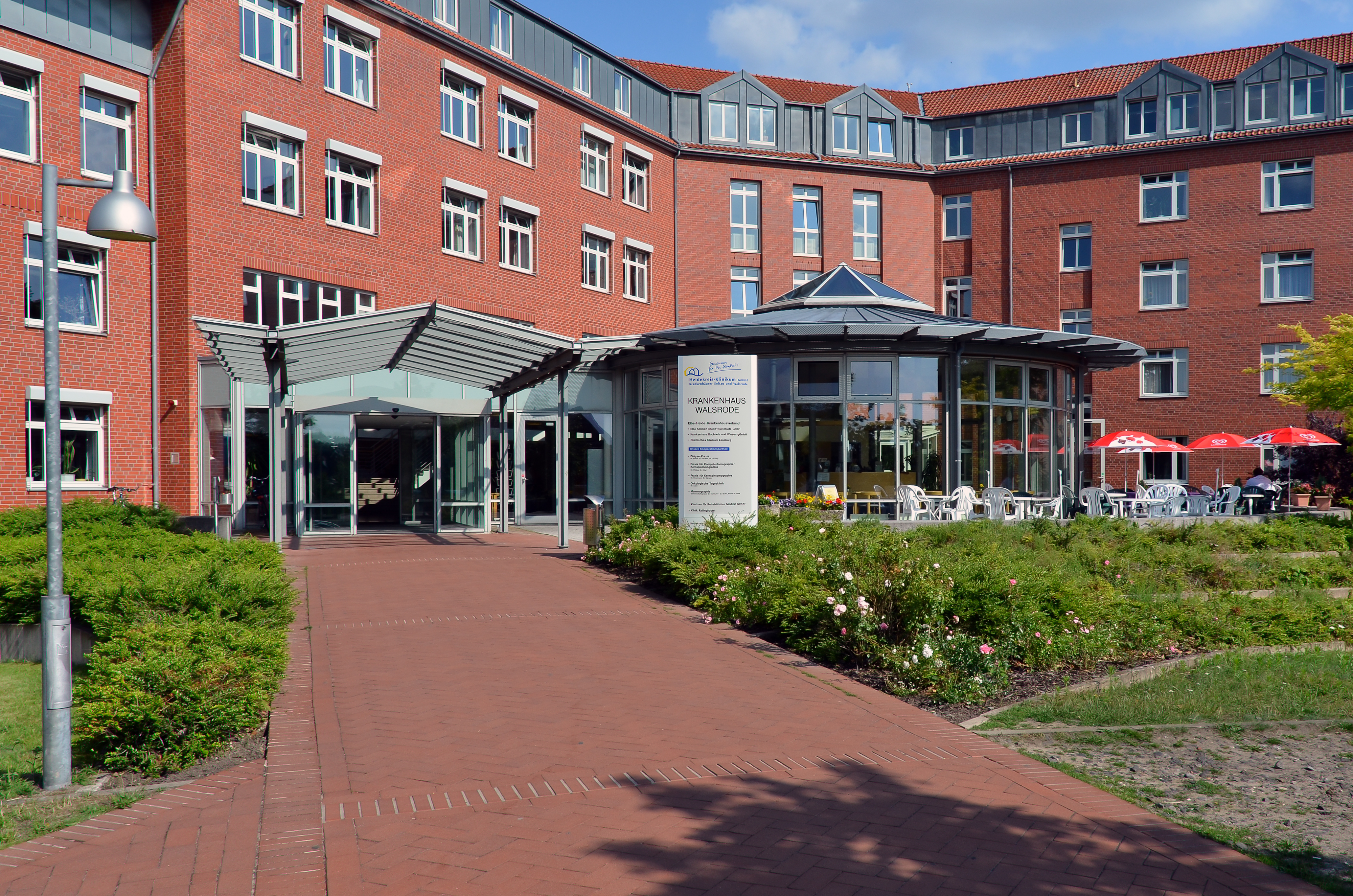 Heidekreis Klinikum Krankenhaus Walsrode, Haupteingang (Lüneburger Heide, Deutschland)